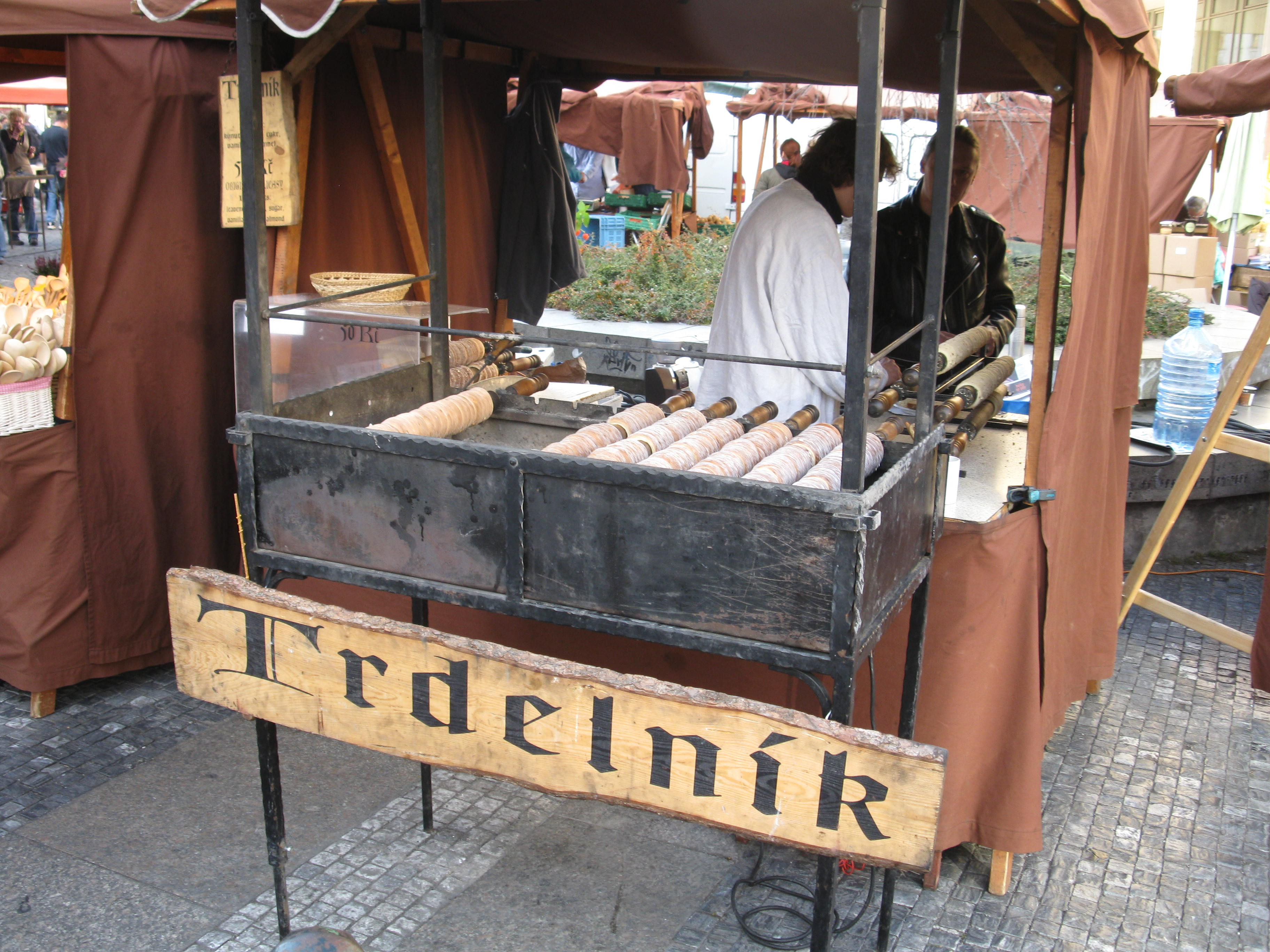 Stragan z Trdelníkami w Pradze